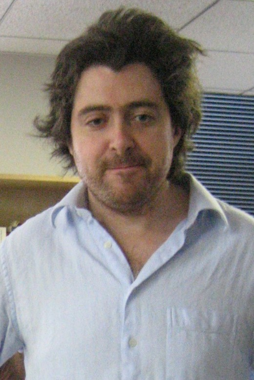 Author Bruno Maddox